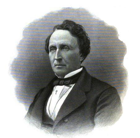 Benjamin Edward Bates (1808–1878)